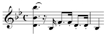 Pianoconcerto 2 Beethoven (opening)